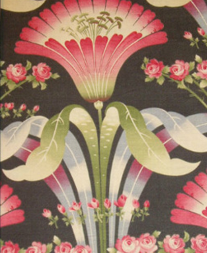 Ситец Товарищества мануфактур наследников Н.Н. и Я.Н.Фокиных в стиле модерн, 1910-е гг.